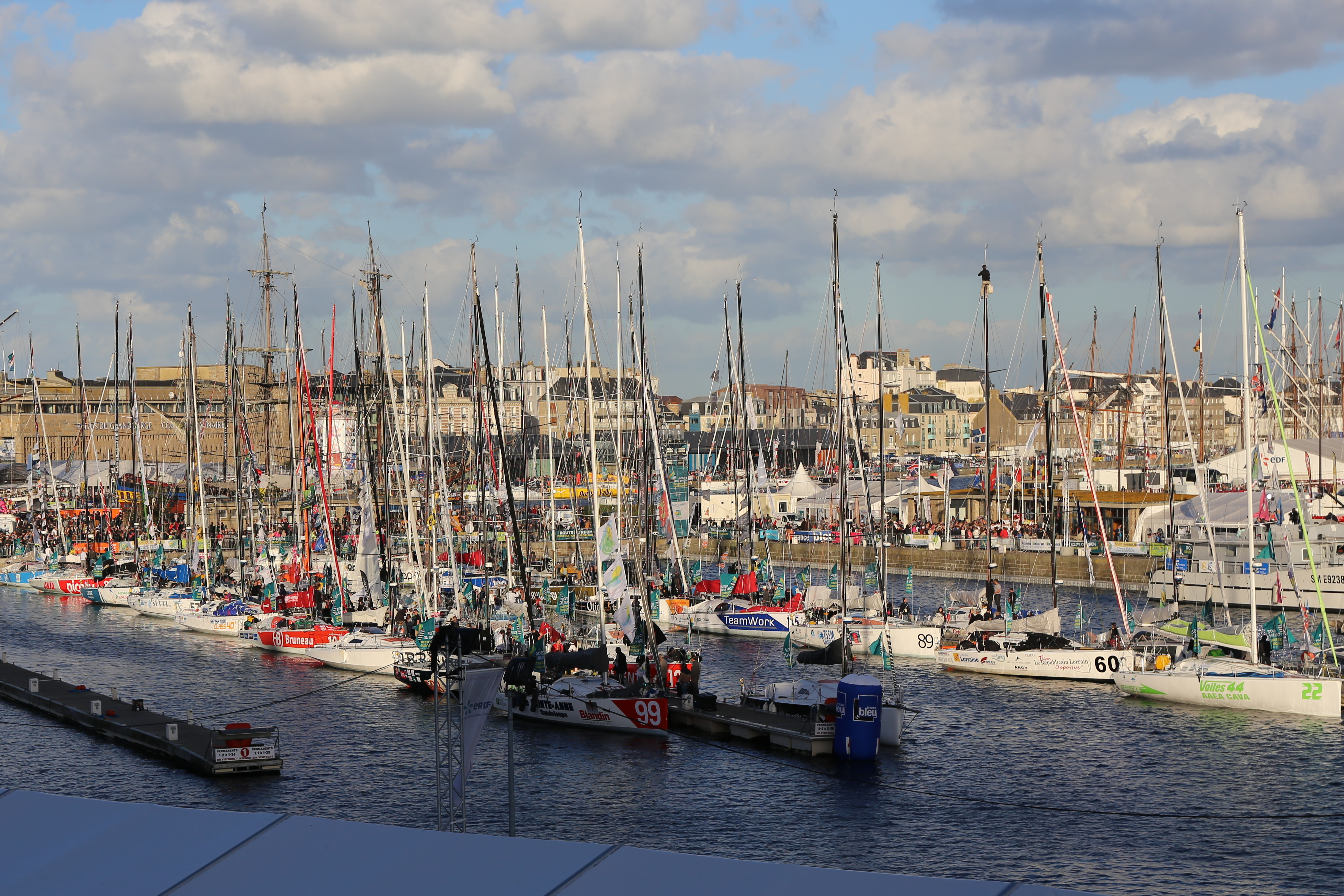 La flotte des Class40 sur les pontons du bassin Vauban avant le départ de la Route du Rhum 2014